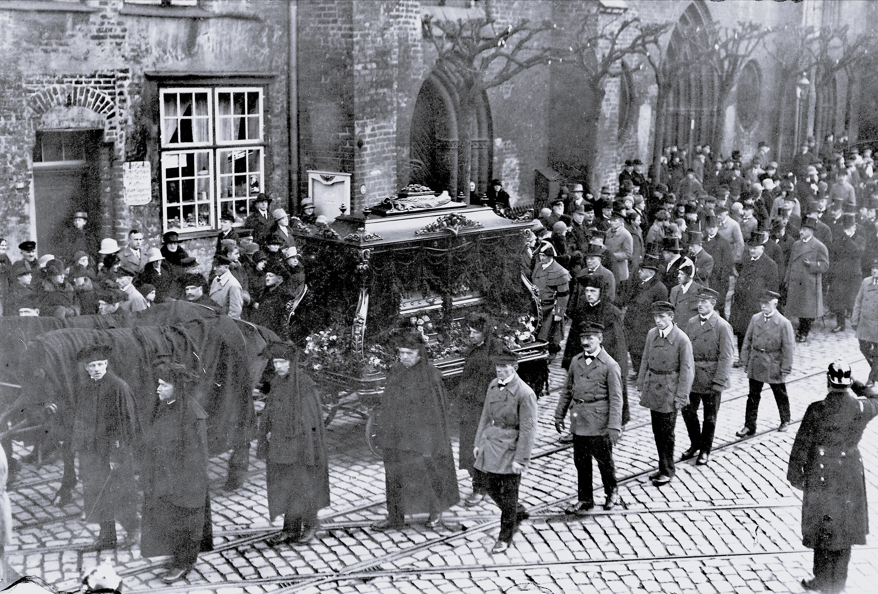 Trauerzug von Paul Hoff auf dem Weg zum Burgtofriedhof Höhe des Heiligen Geist Hospitals.